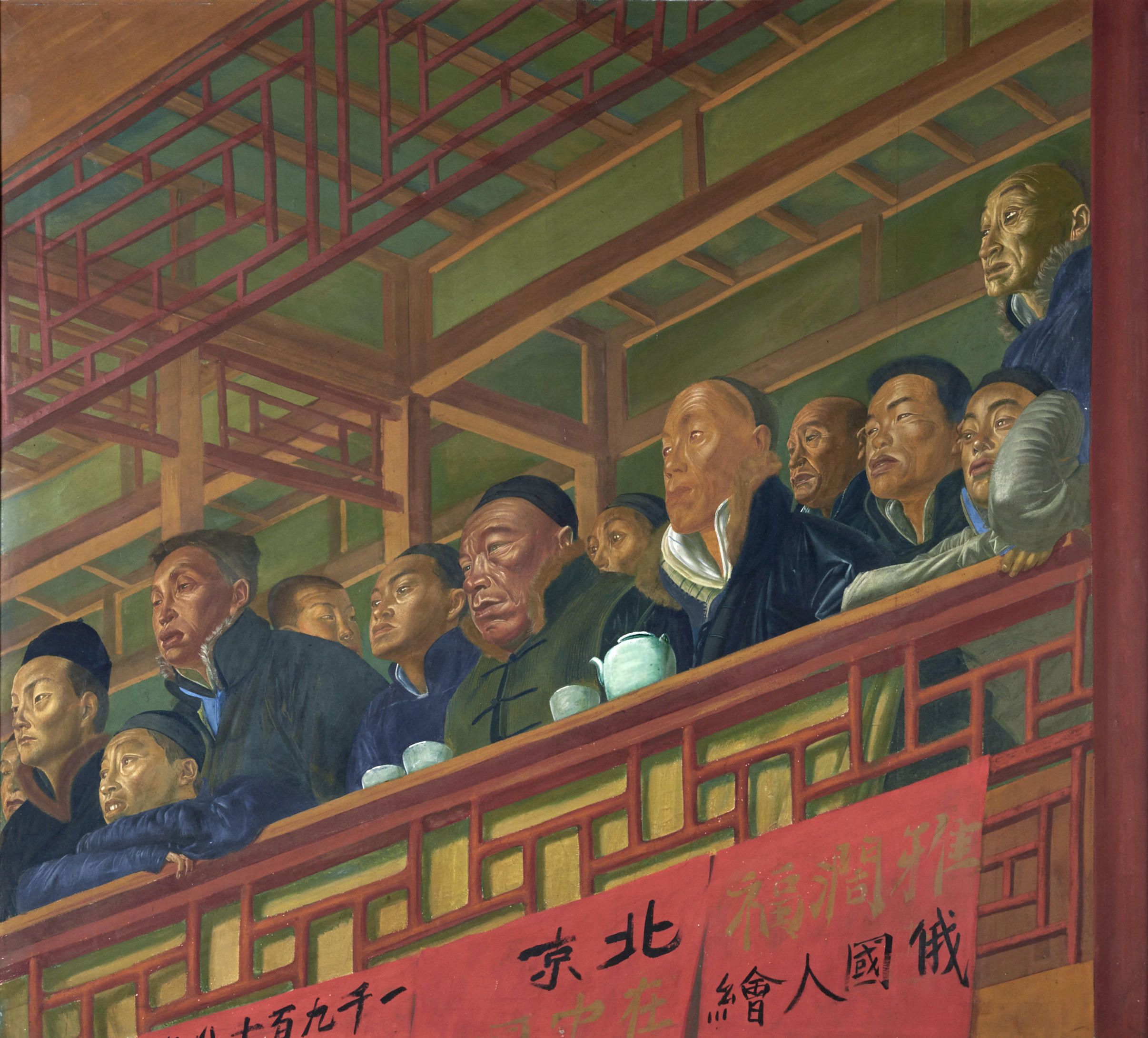 Loge de Theatre a Pekin 1918 холст, темпера 107.80/118.00 см